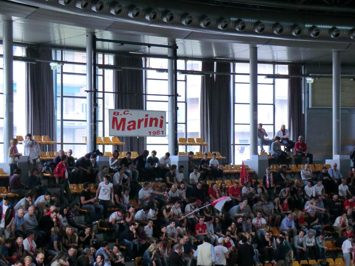 Alcune immagini scattate in occasione dell'incontro di LegaDue tra Bologna e Forlì al PalaDozza di Bologna.